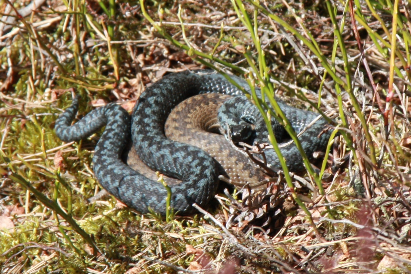 To hoggormer sammen